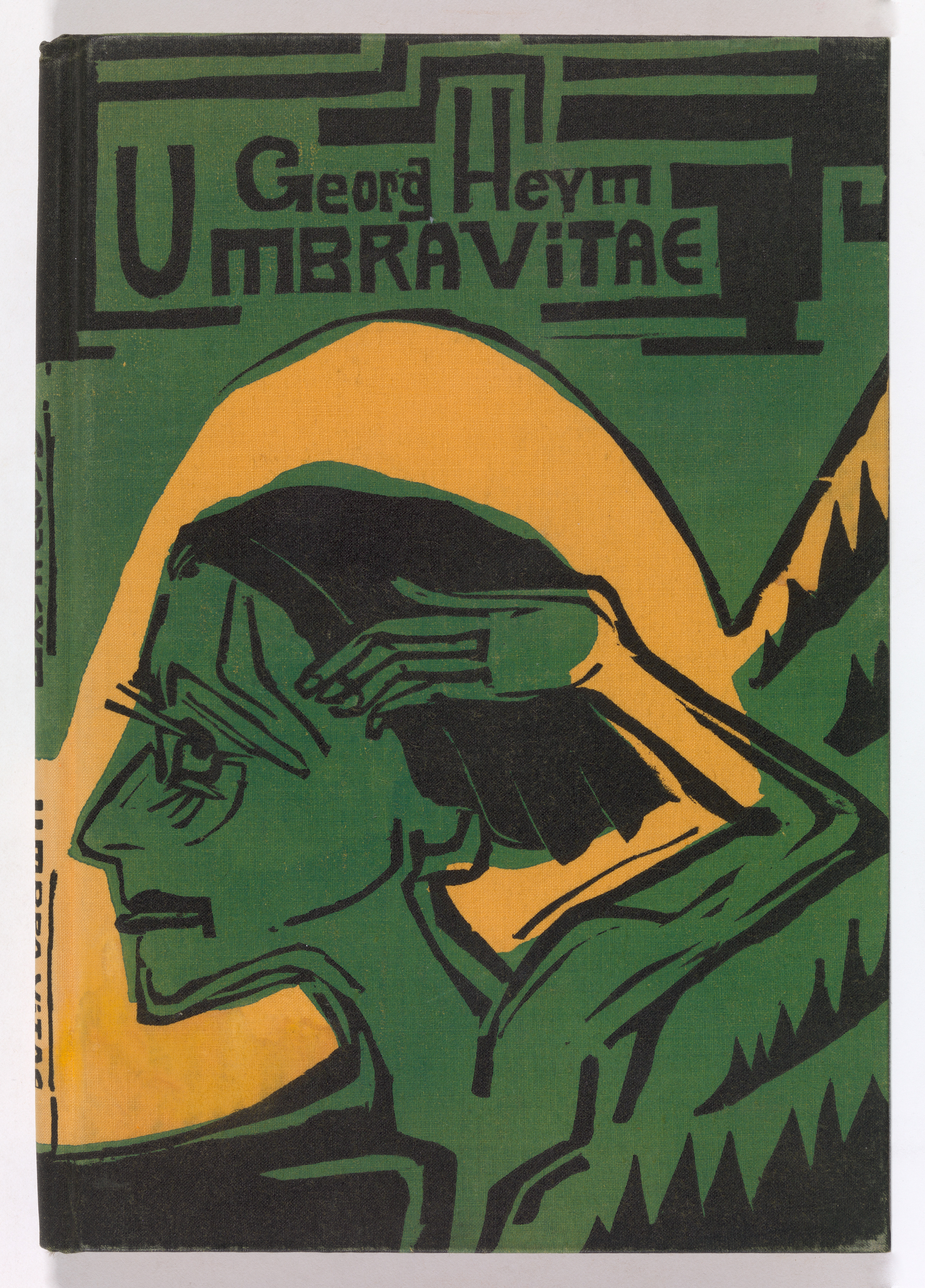 Book; Books